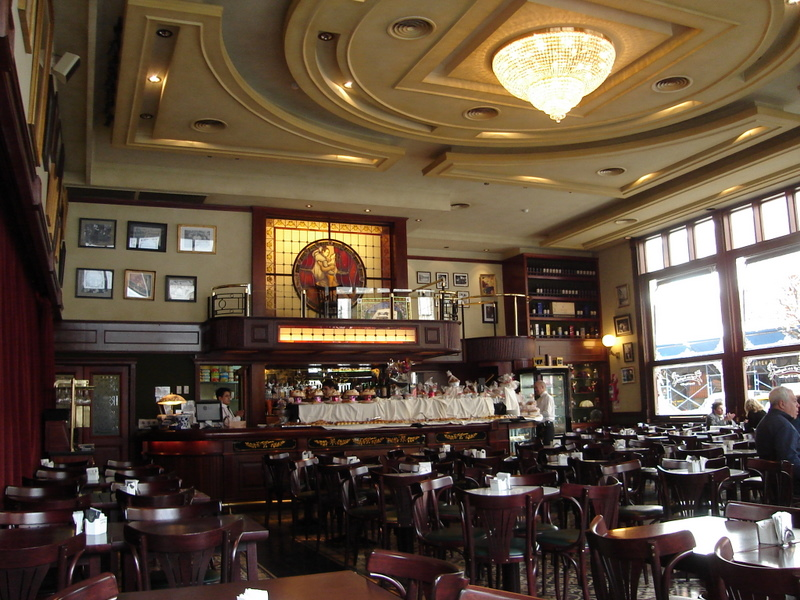 Café Los Angelitos, Rivadavia y Rincón, barrio de Balvanera, Buenos Aires, Argentina.